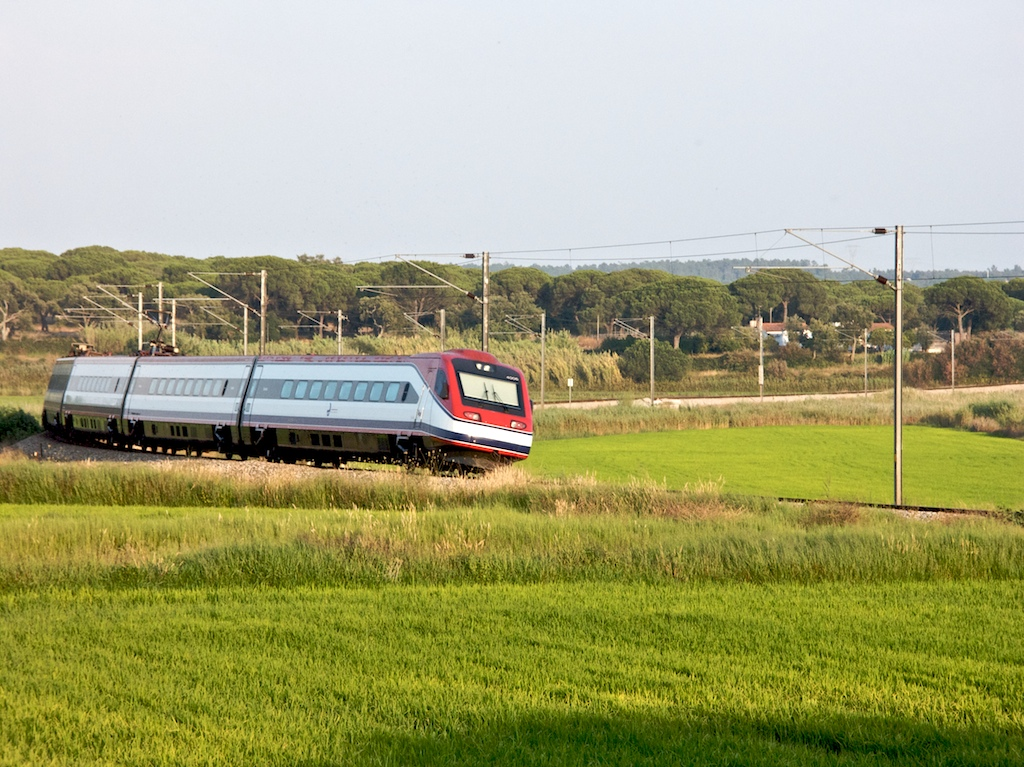 Tipo: Comboio Alfa Pendular 186 [Porto • Campanhã - Faro] Local: Alcácer do Sal [Linha do Sul, PK 72] Data e hora: 15 de Julho de 2008 [19h50] Material: Automotora 4006 [Comboio de Pendulação Activa] som desta foto aqui.